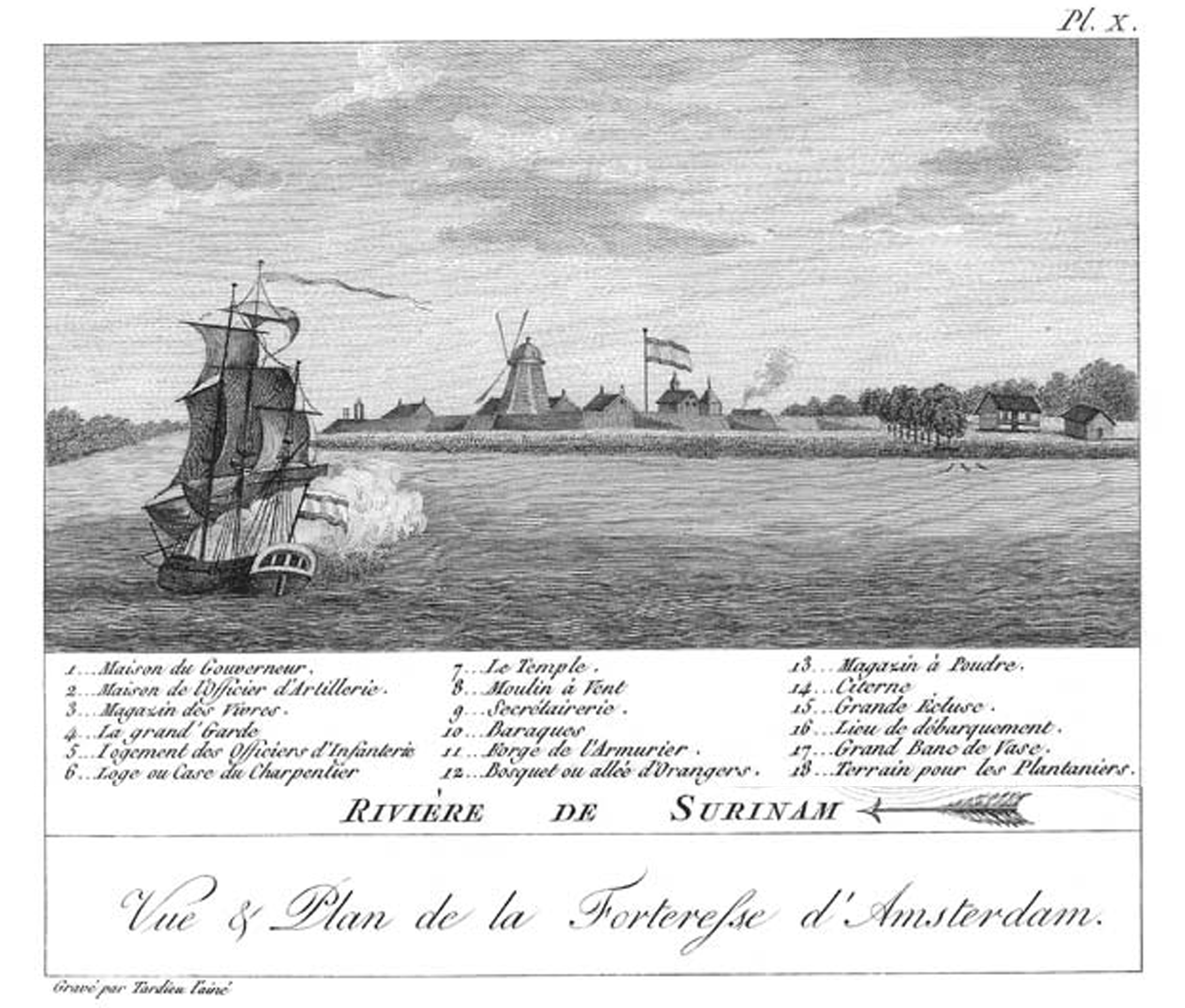 Entrée du port de Paramaribo, Surinam